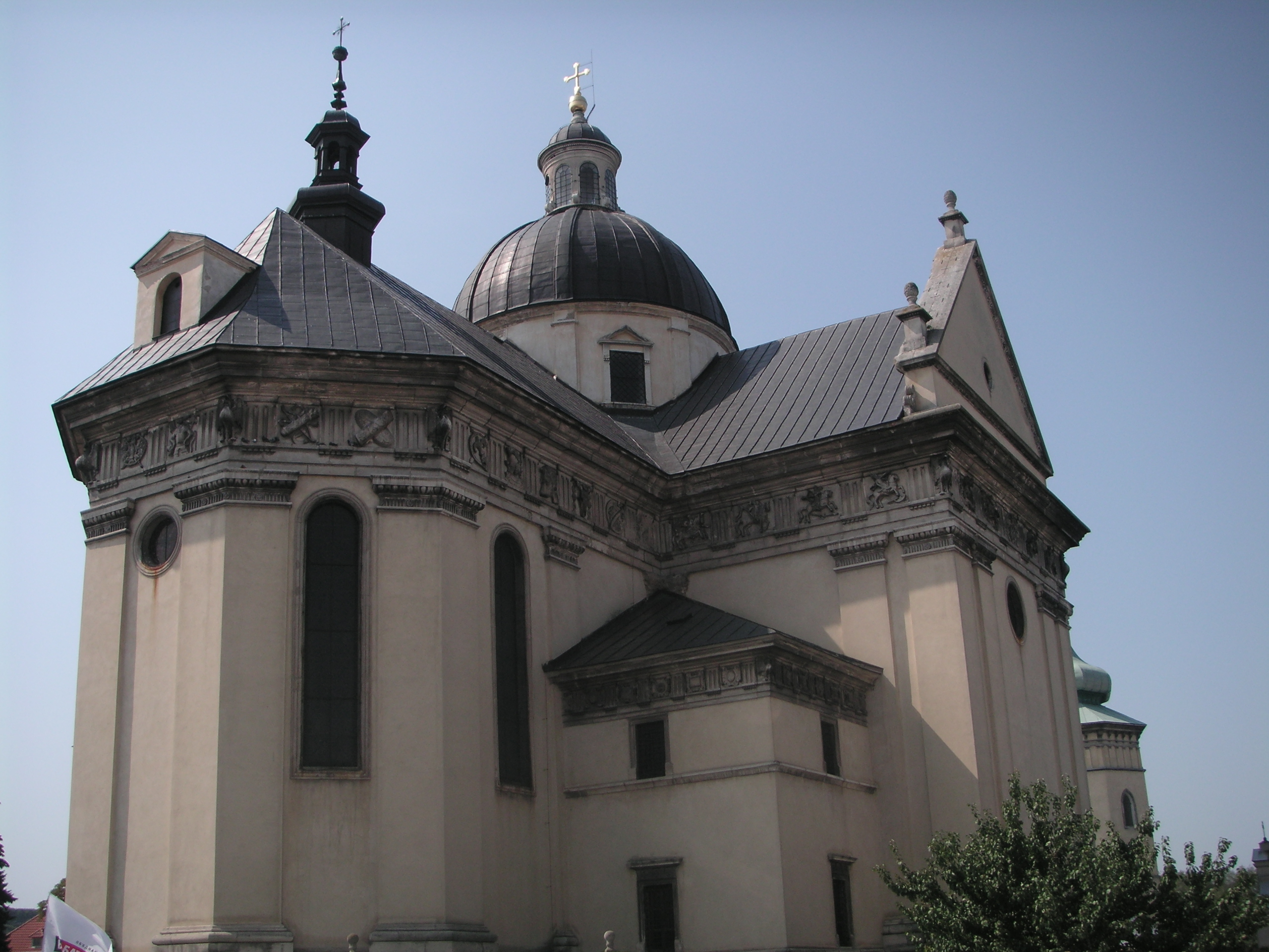 Костел Св.Лаврентія (мур.), Жовква, пл.Вічева